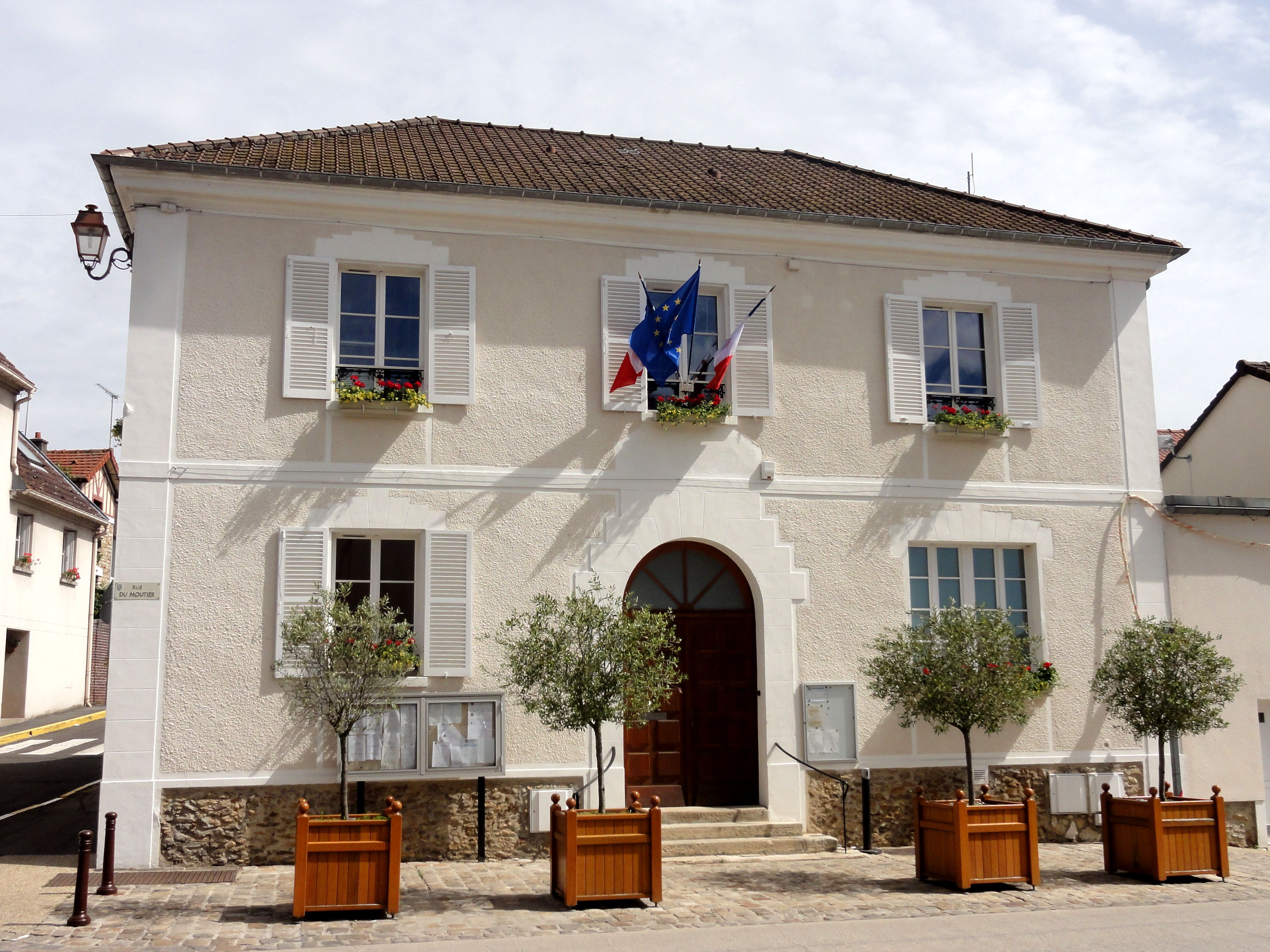 La mairie, rue du Moutier.